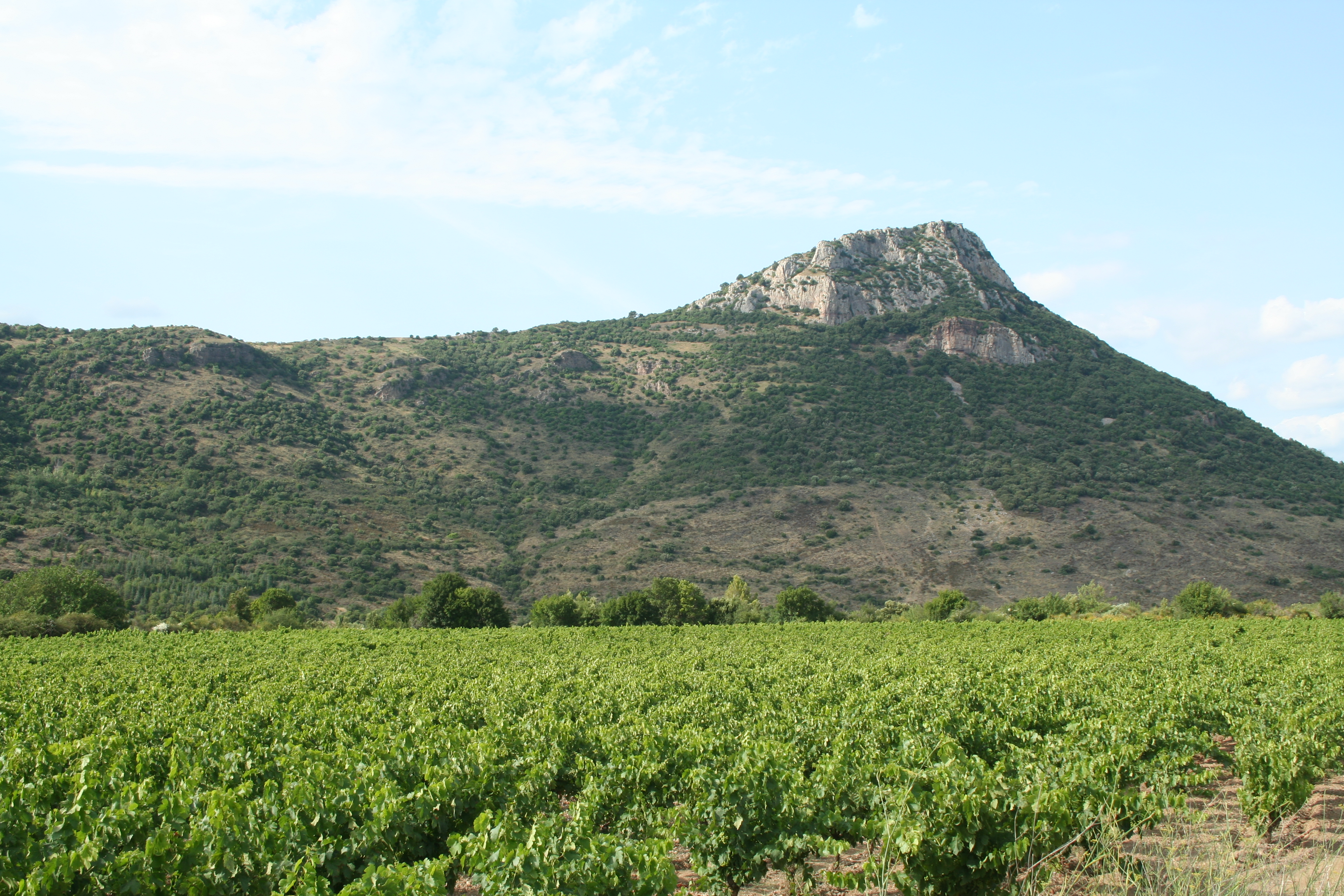 Cabrières (Hérault) - Pic de Vissou (480 m), vu depuis la route de Valmascle.